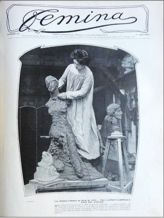 Première page du magazine français Femina du 1er mai 1903 consacré au femmes artistes. Ici, la sculptrice Louise Clément-Carpeaux (1872-1961), fille de Jean-Baptiste Carpeaux.